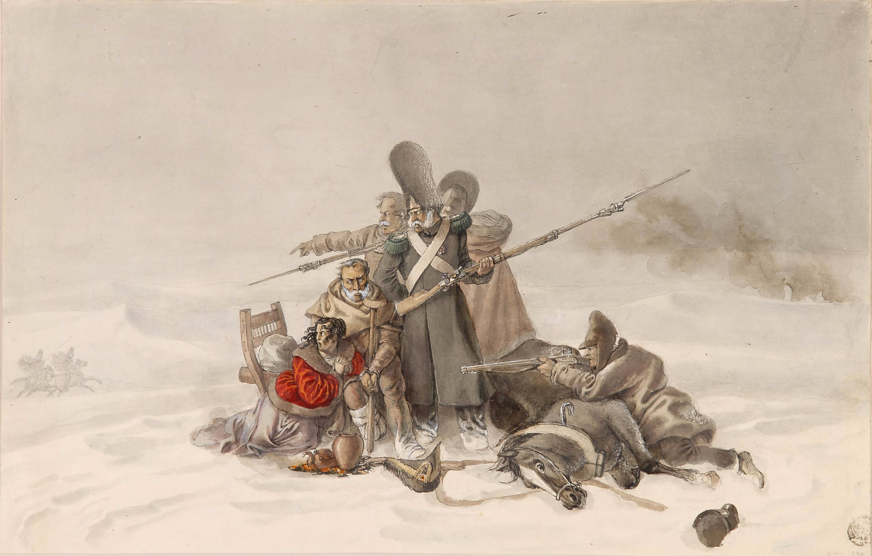 Беларуская (тарашкевіца): Бобр (Bobr). Каля мястэчка, 23 лістапада 1812